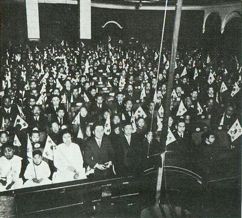 1921년, 평양, 흥사단 원동위원부 결성식, 앞줄 중앙이 이광수